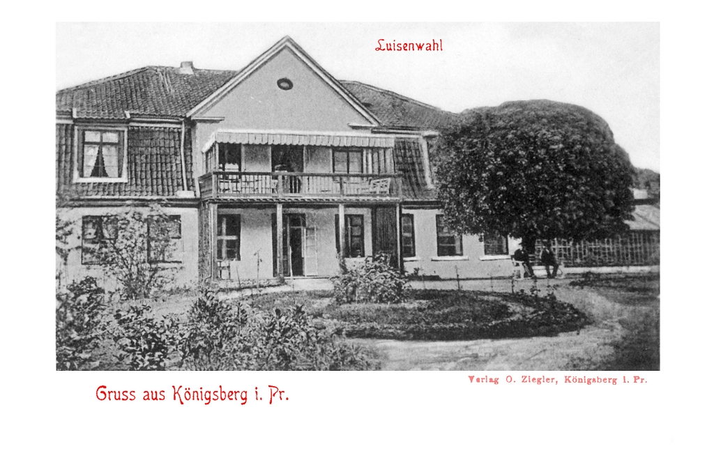 Luisenwahl Königsberg